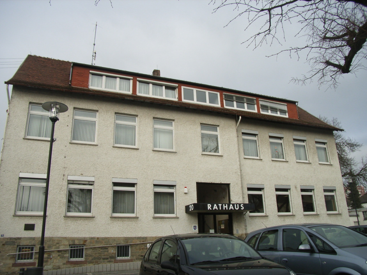 Steinbacher Rathaus